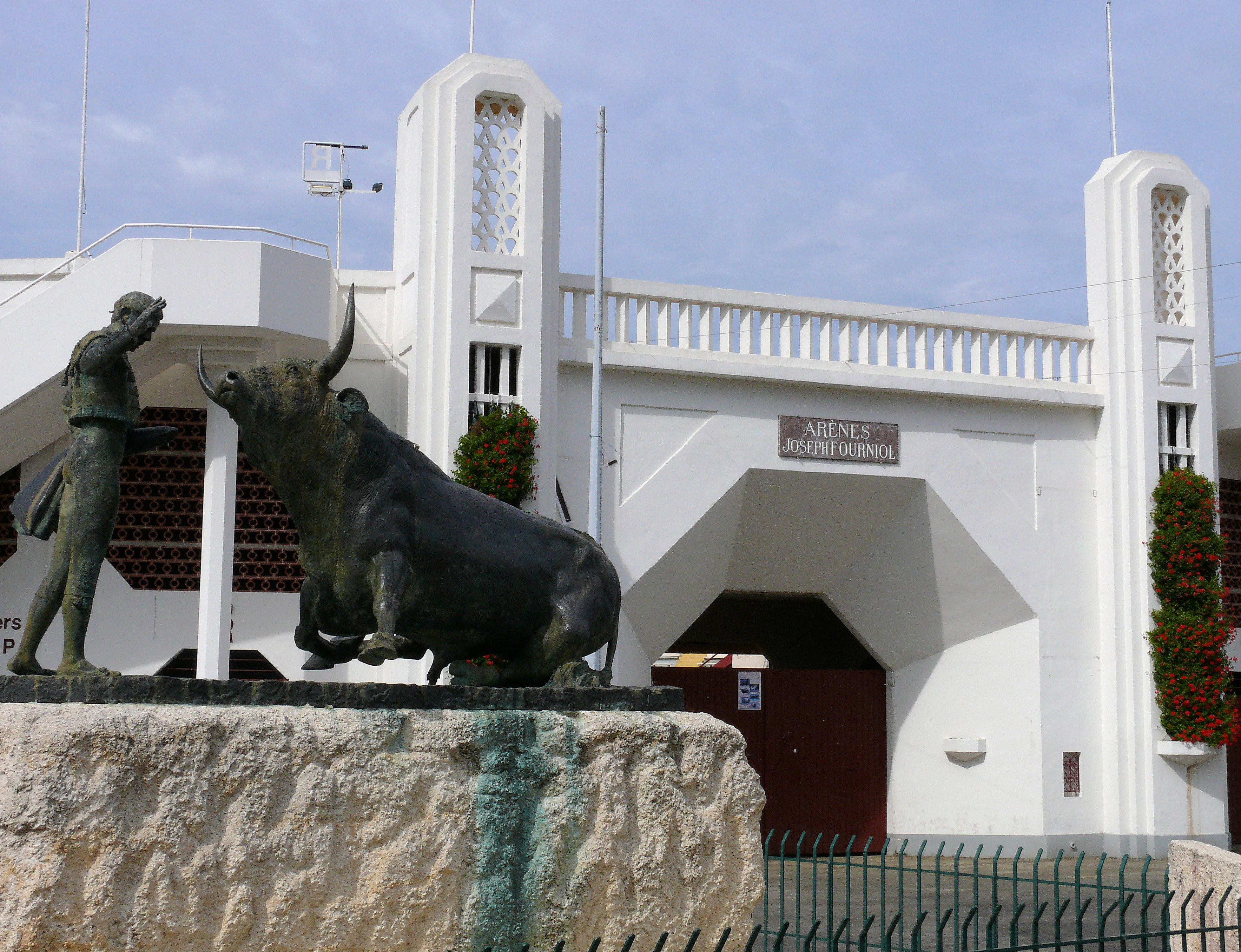 Vic-Fezensac - Arènes Joseph Fourniol et le monument en hommage au torero Ruiz Miguel